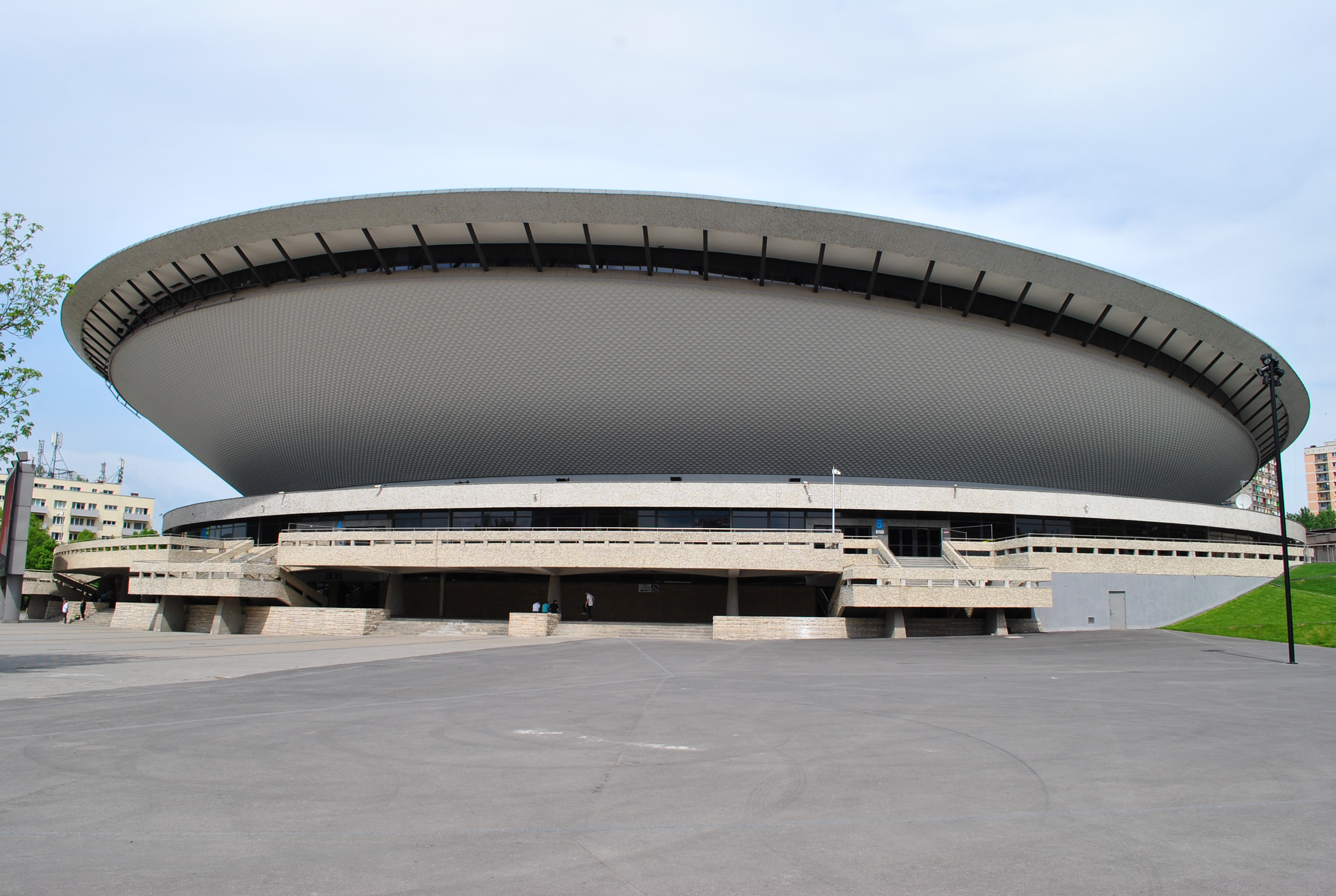 Hala widowiskowo-sportowa Spodek w Katowicach